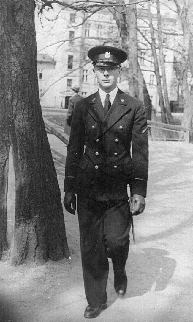 Podporucznik Stanisław Pierzchlewski w czasie nauki w szkole podchorążych